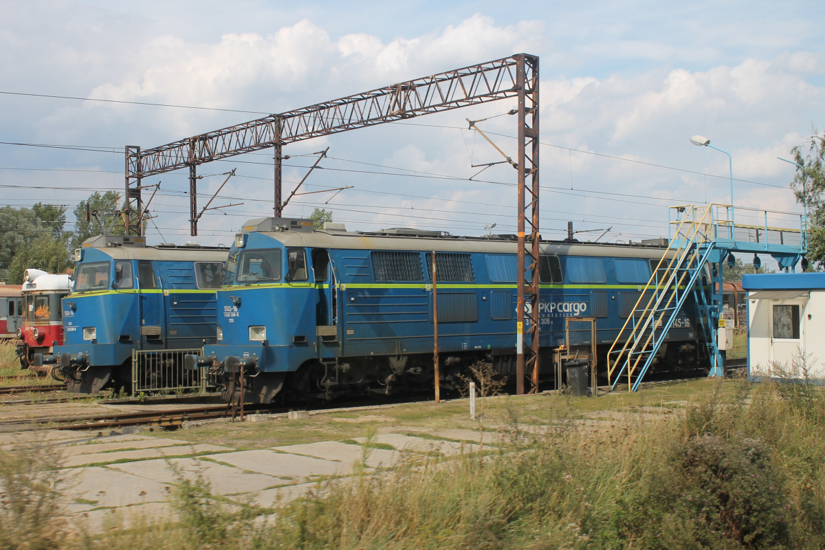 Spalinowozy ST45-16 i ST45-14 na terenie bazy Toruń Kluczyki w pobliżu przystanku o tej samej nazwie. This photo was taken during Railway Wikiexpedition 2014 set up by Wikimedia Polska Association in cooperation with Fundacja Grupy PKP. You can see all photographs in category Wikiekspedycja kolejowa 2014.